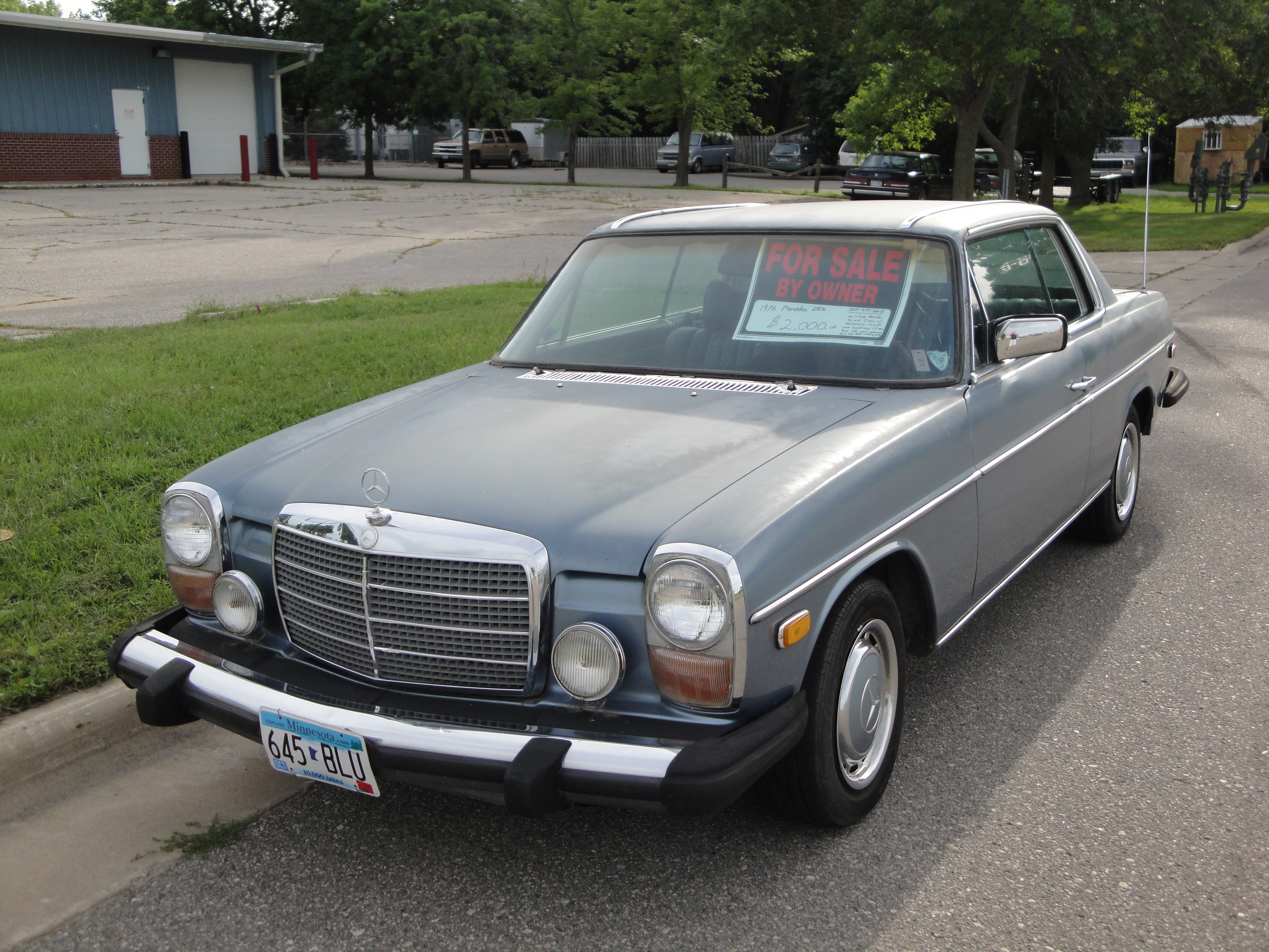 76 Mercedes 280C